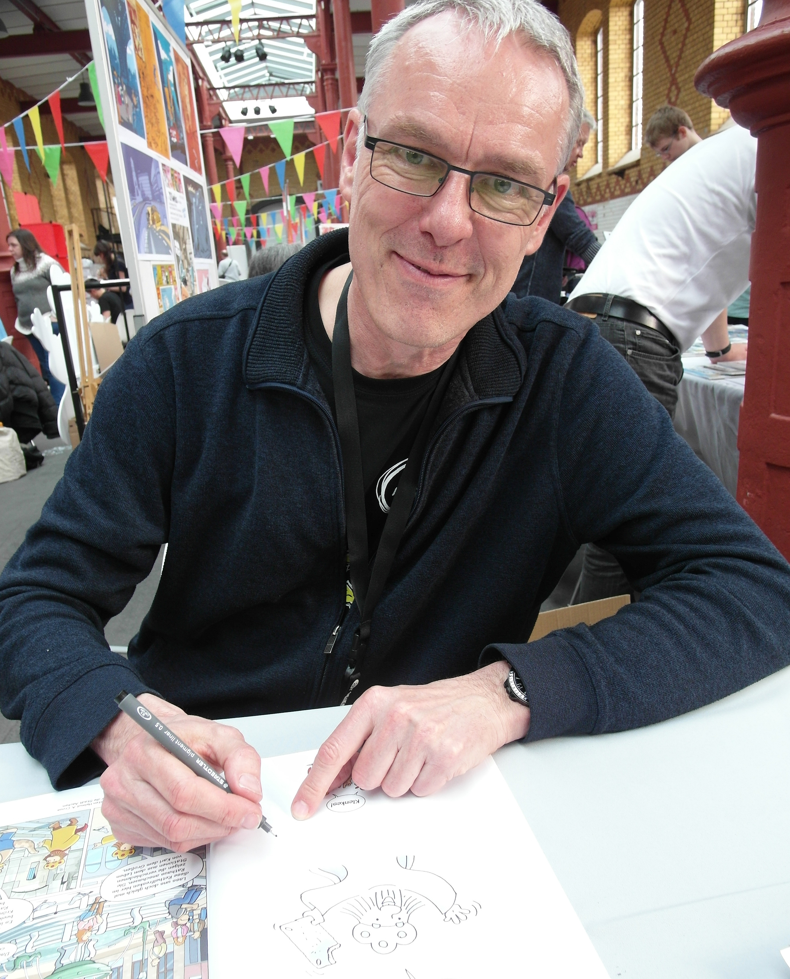 Alfred Neuwald, Comicautor, Illustrator und Cartoonist, beim Signieren auf der COMICIADE 2018 in Aachen